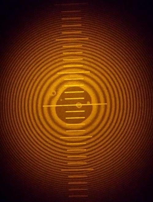 Newtonsches Interferenzbild zwischen einer schwach gekrümmten Linse (R= ca. 13m) und einer Planplatte, beleuchtet durch das monochromatische Licht einer Natriumdampflampe (582,3nm).